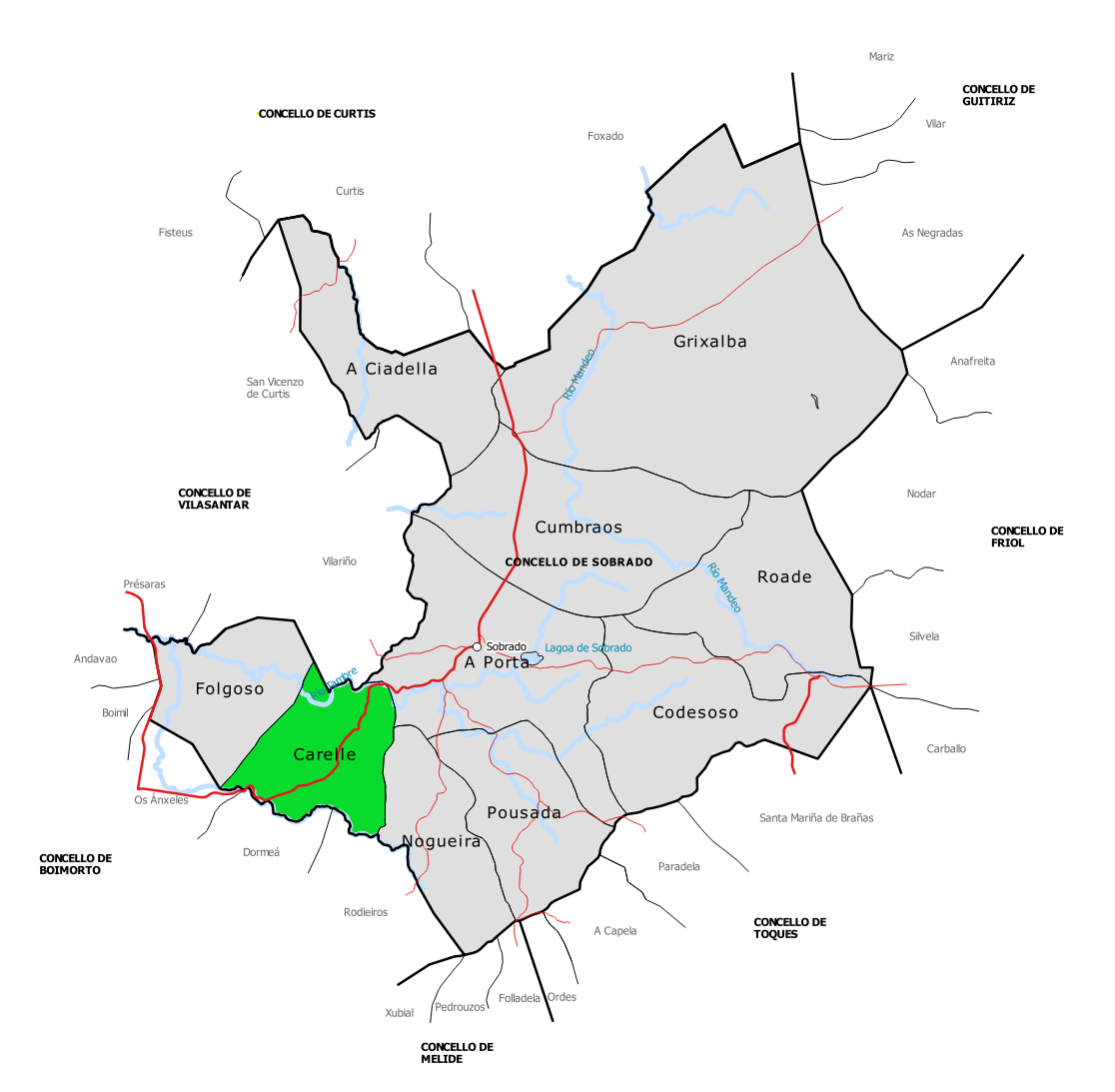 Mapa da parroquia de Carelle no concello de Sobrado (Galiza).